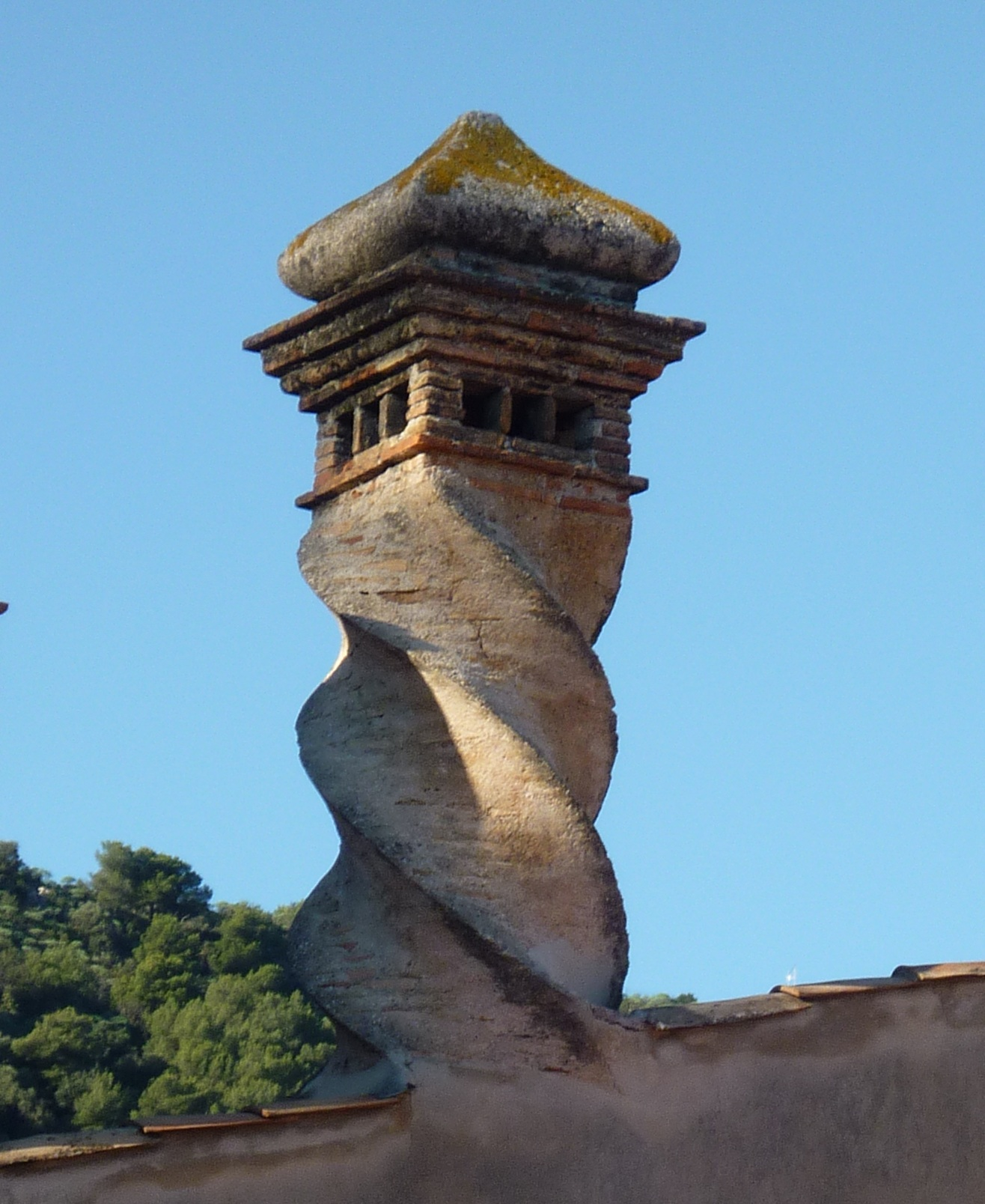 Darse de Villefranche-sur-Mer : Cheminée de la Vieille forge (de style génois)